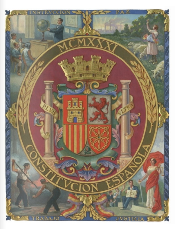 Portada del ejemplar a pluma de la Constitución de 1931 guardado en el Congreso de los Diputados.